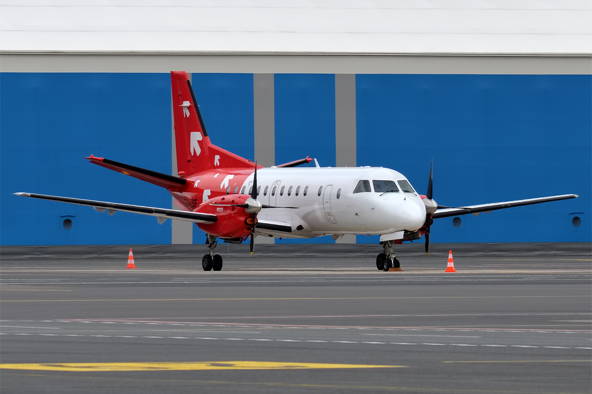 Airest, ES-LSE, Saab 340AF